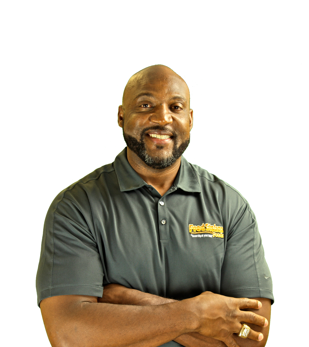 Fred Stokes